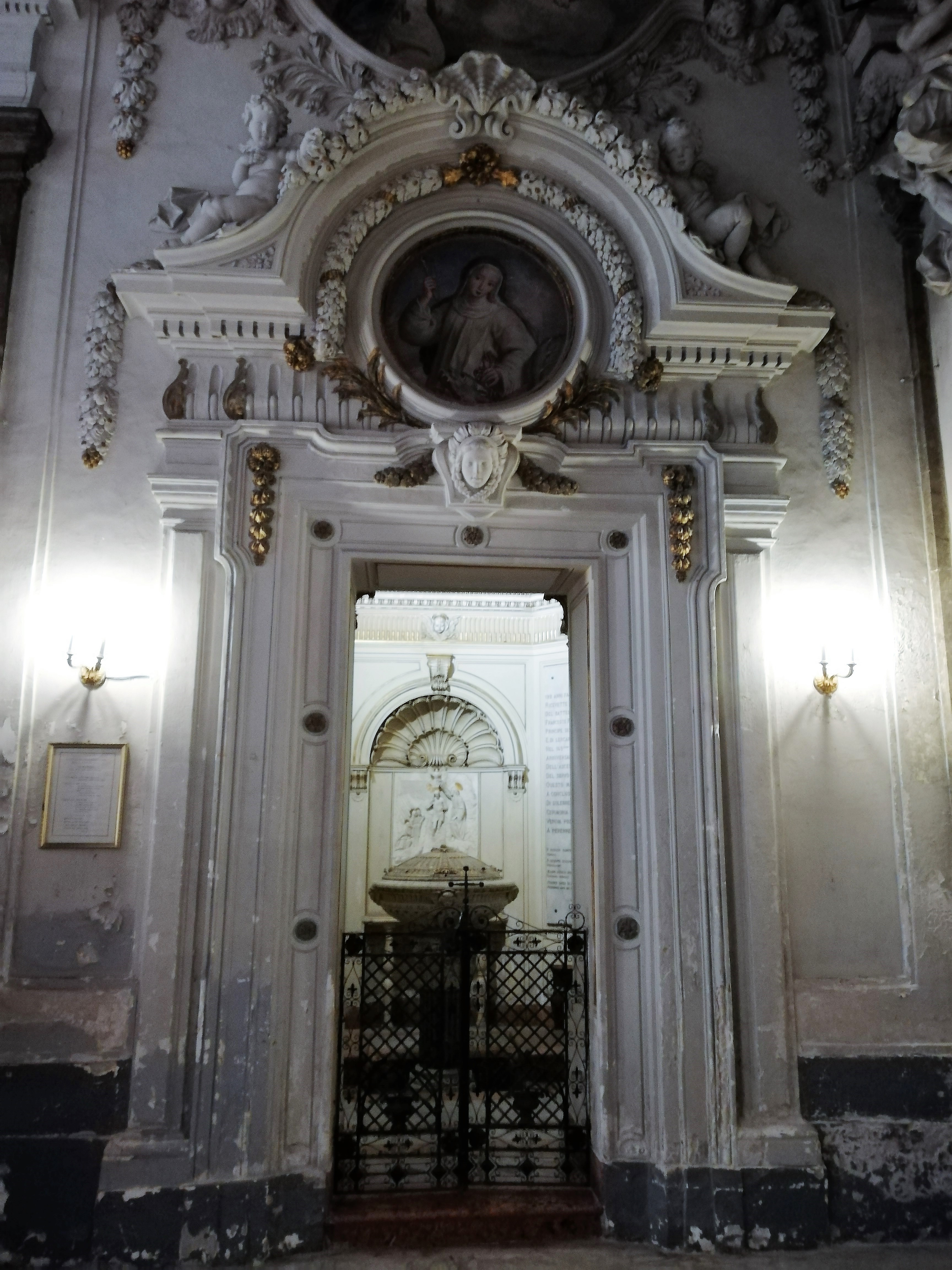 Ambiente del fonte battesimale.